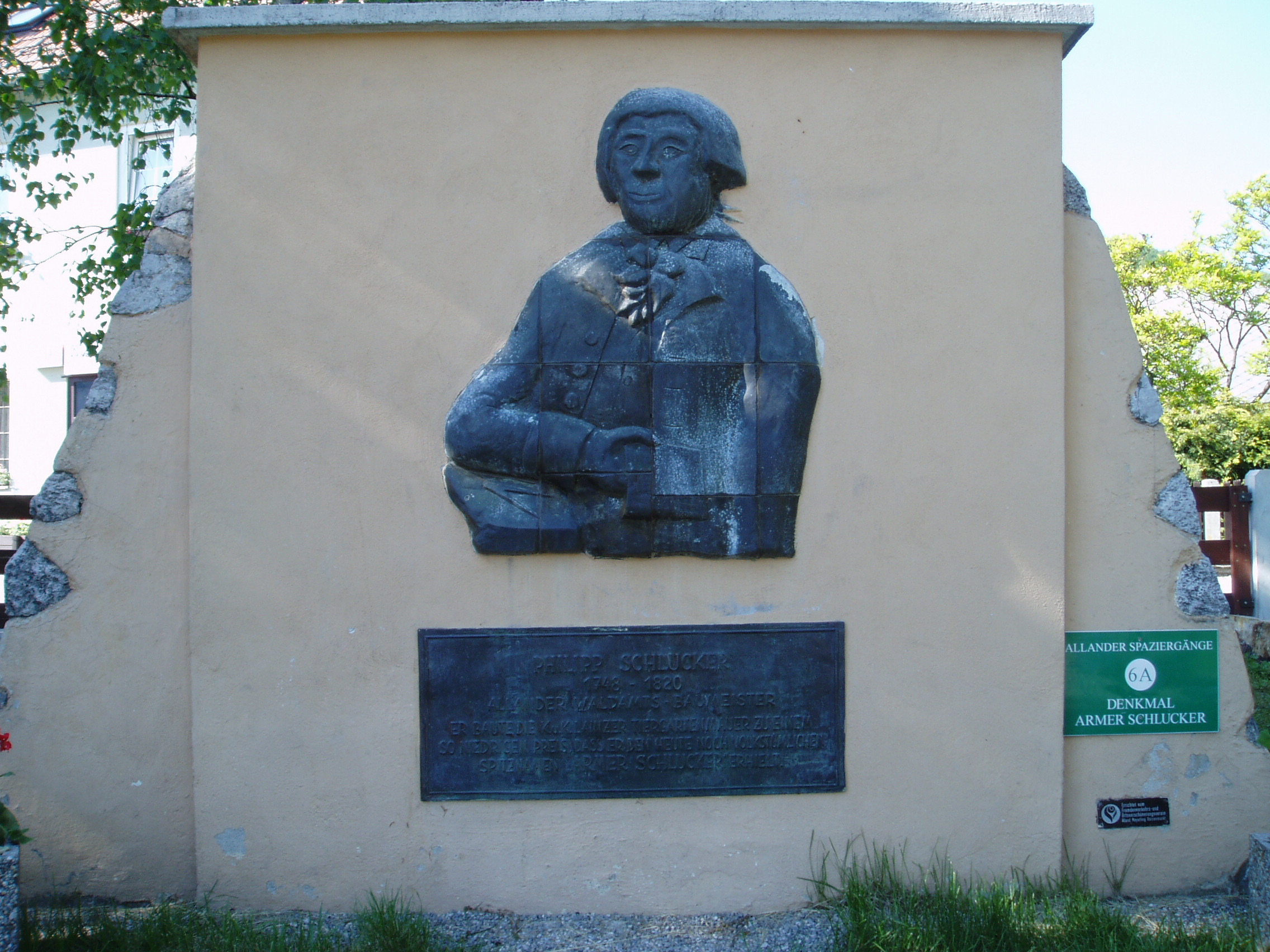 Denkmal des Armen Schlucker in Alland.